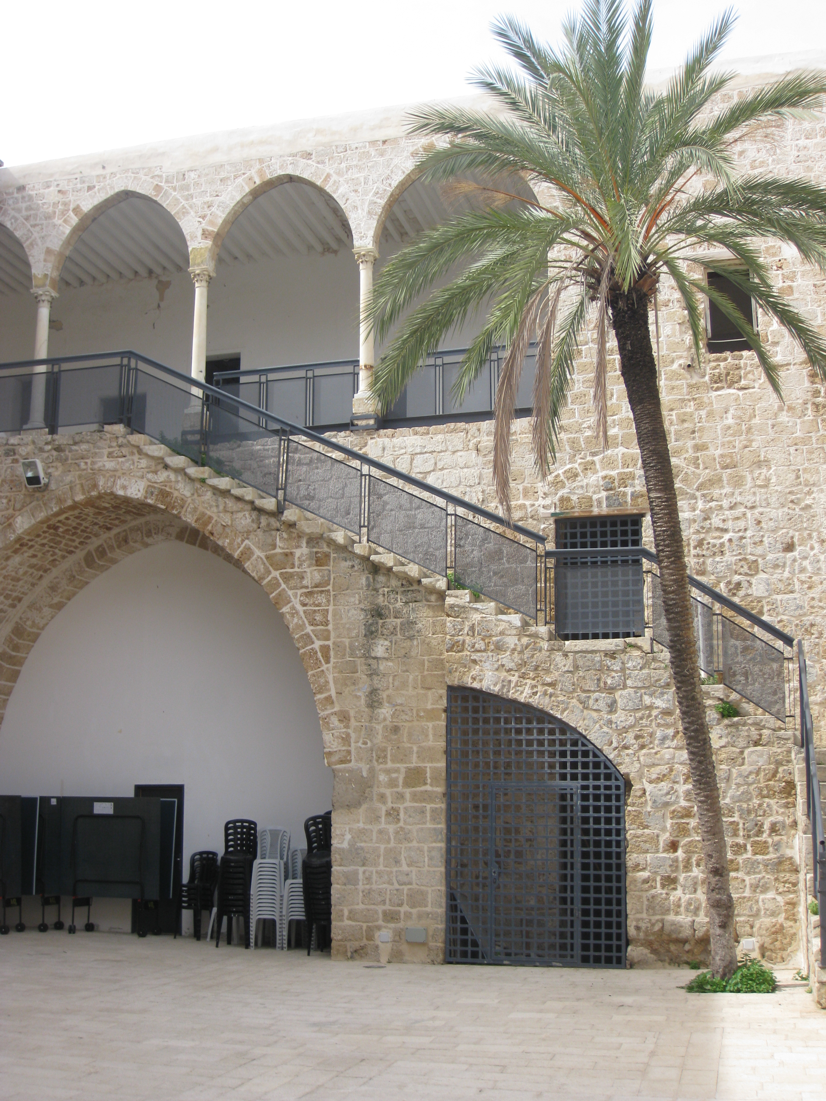 Acco (Acre, Akko) - Akko Saray Building. Today - a caltural centre עכו בית הסאריה של עכו. כיום מרכז תרבות.